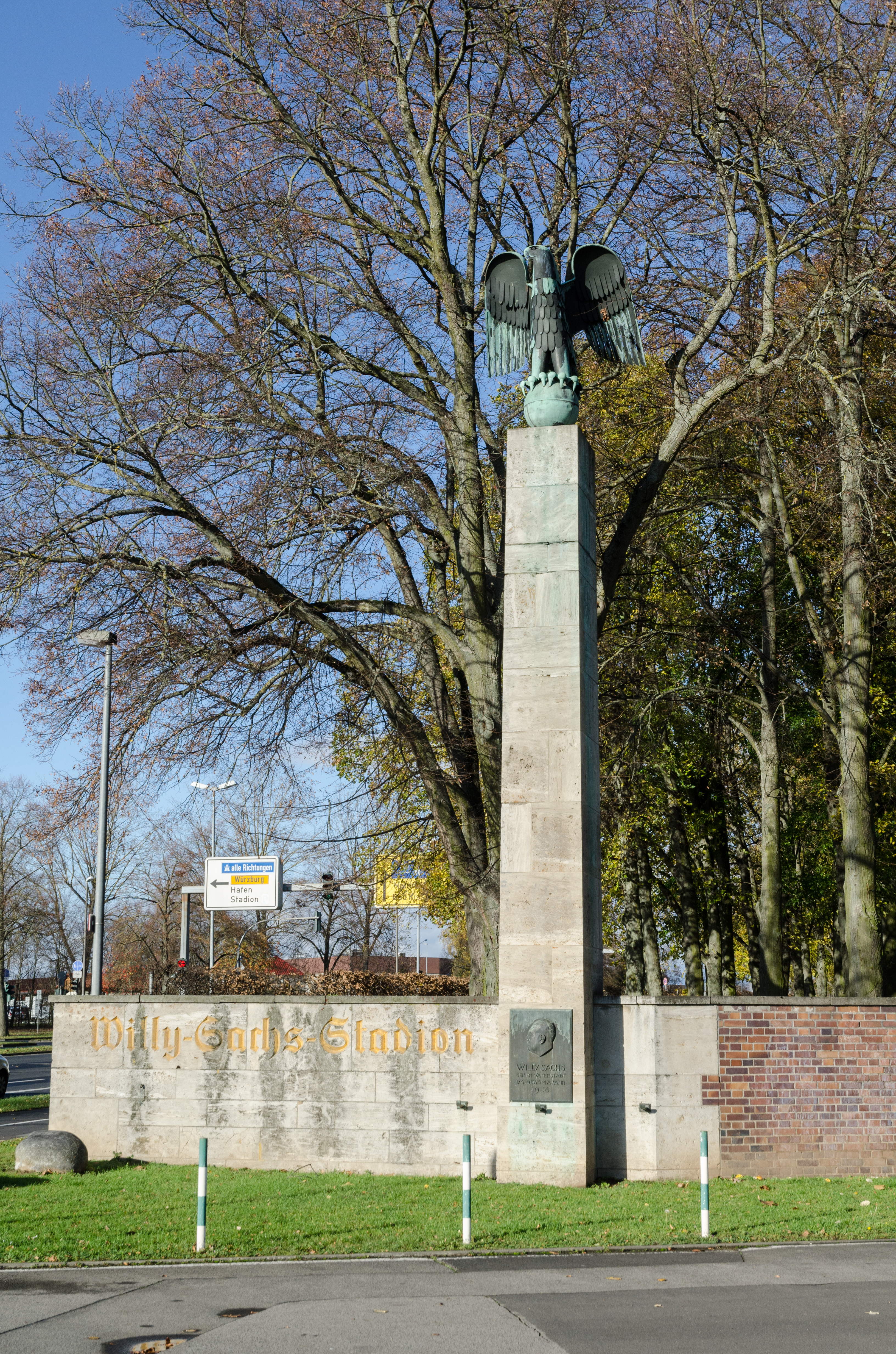 Schweinfurt, Williy-Sach-Stadion, Eingangspfeiler